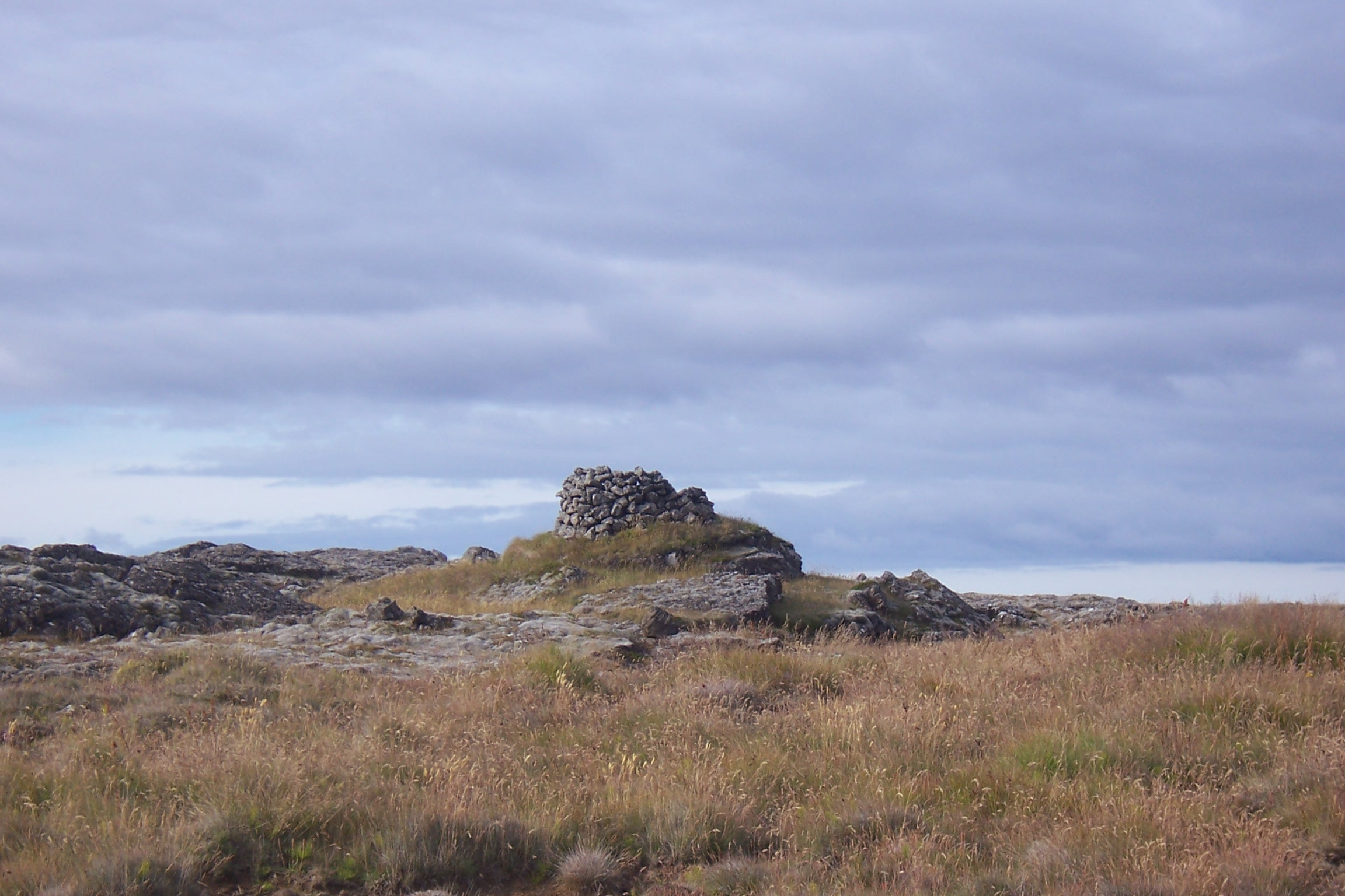 Hleðslur á Reykjanesi, nánar tiltekið í grend við hraunið fyrir ofan Grindavík